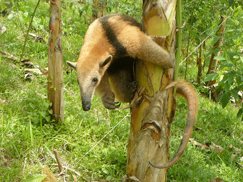 Ein Kleiner Ameisenbäre oder auch Tamandua (Tamandua mexicana) genannt. Fotografiert auf der ForestFinance Finca "Bocas del Toro" im nördlichen Panama.